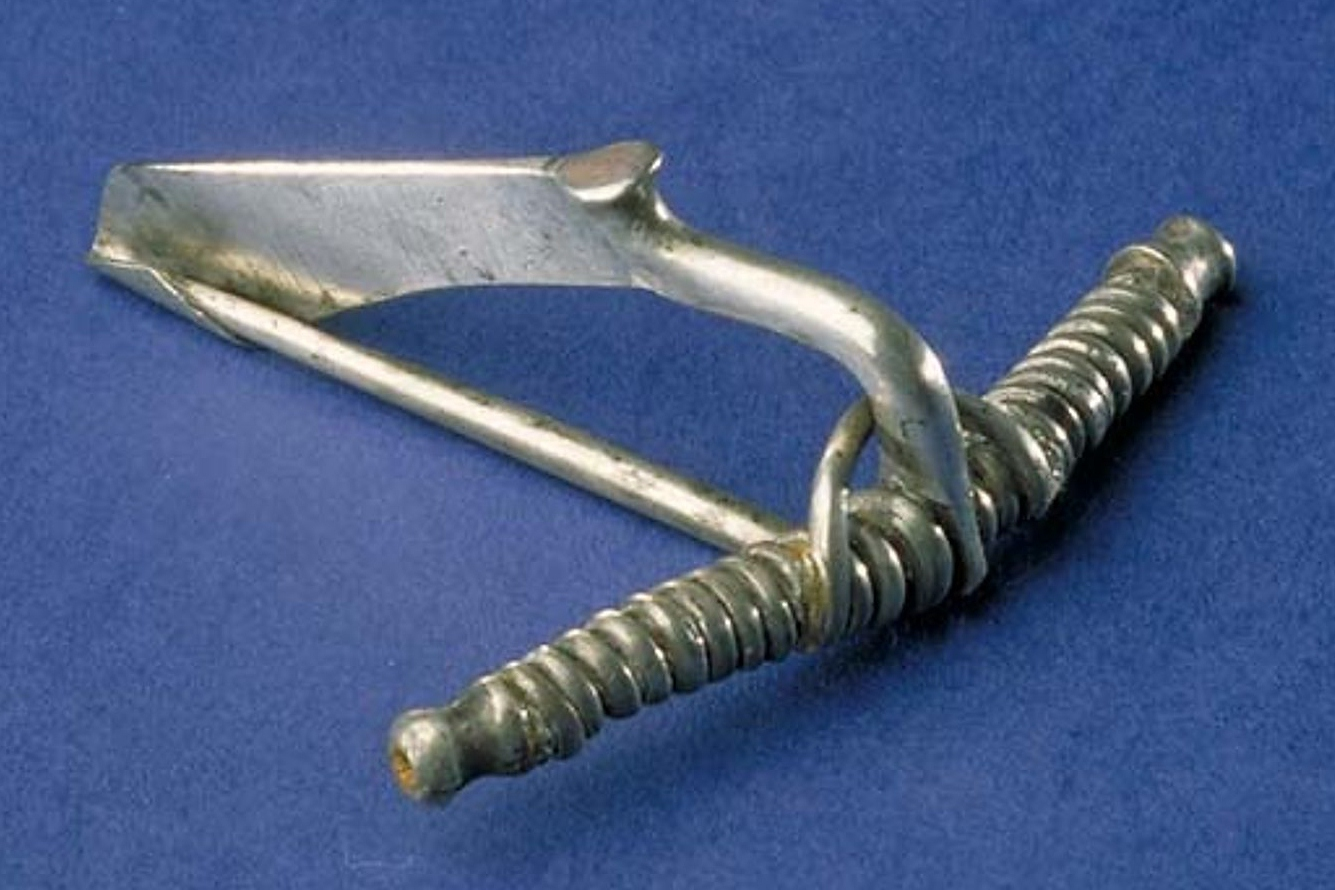 Gårdlösafibulan. Statens historiska museum, inventarienummer 25302.